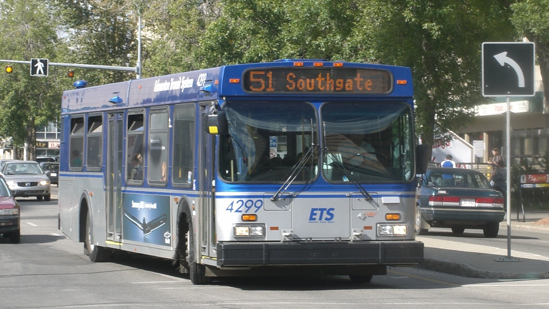 ETS bus 4299.